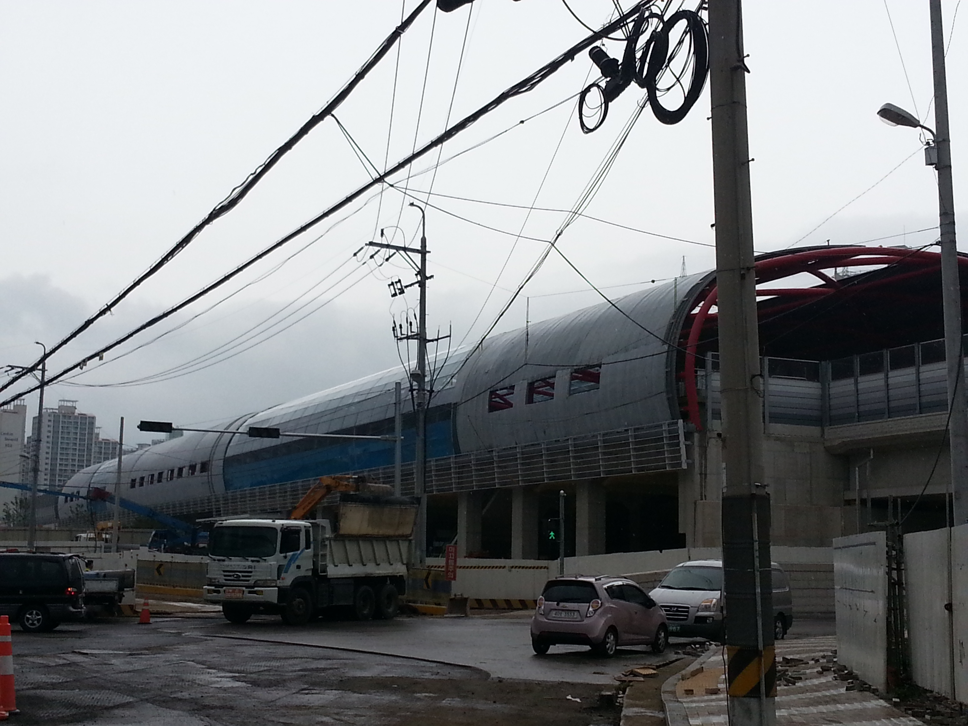 電鉄線化に伴い、建設中のBEXCO(旧佑一)駅新駅舎